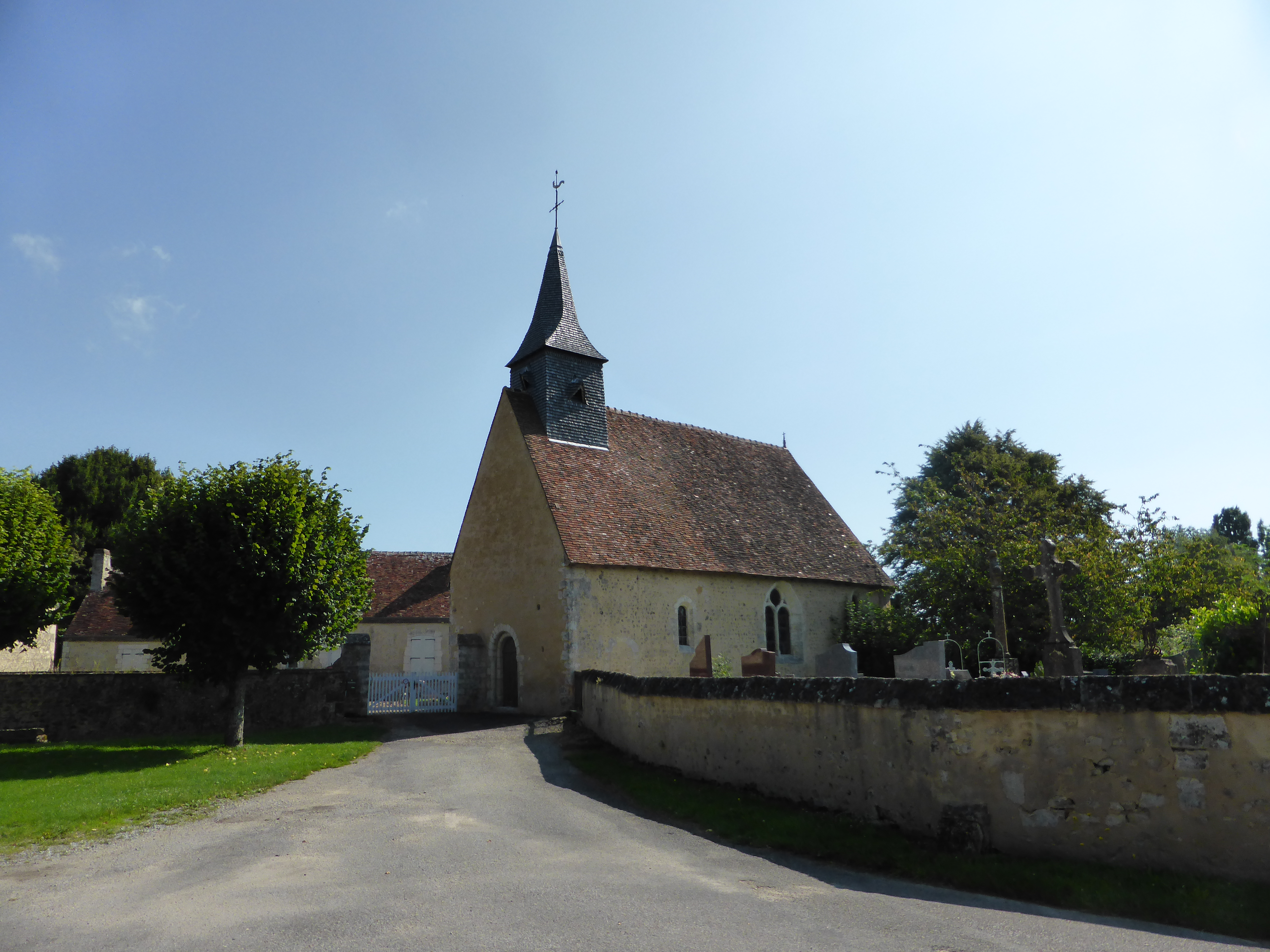 Église de Saint-Aubin-des-Grois.